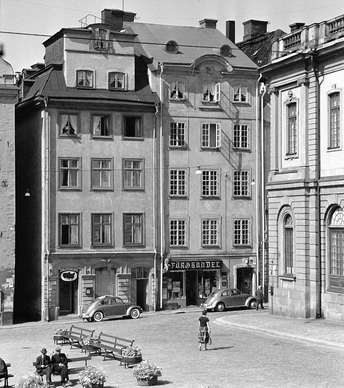 Stortorget med husen Trångsund 16 och 14 (Aesculapius 3 och 2)